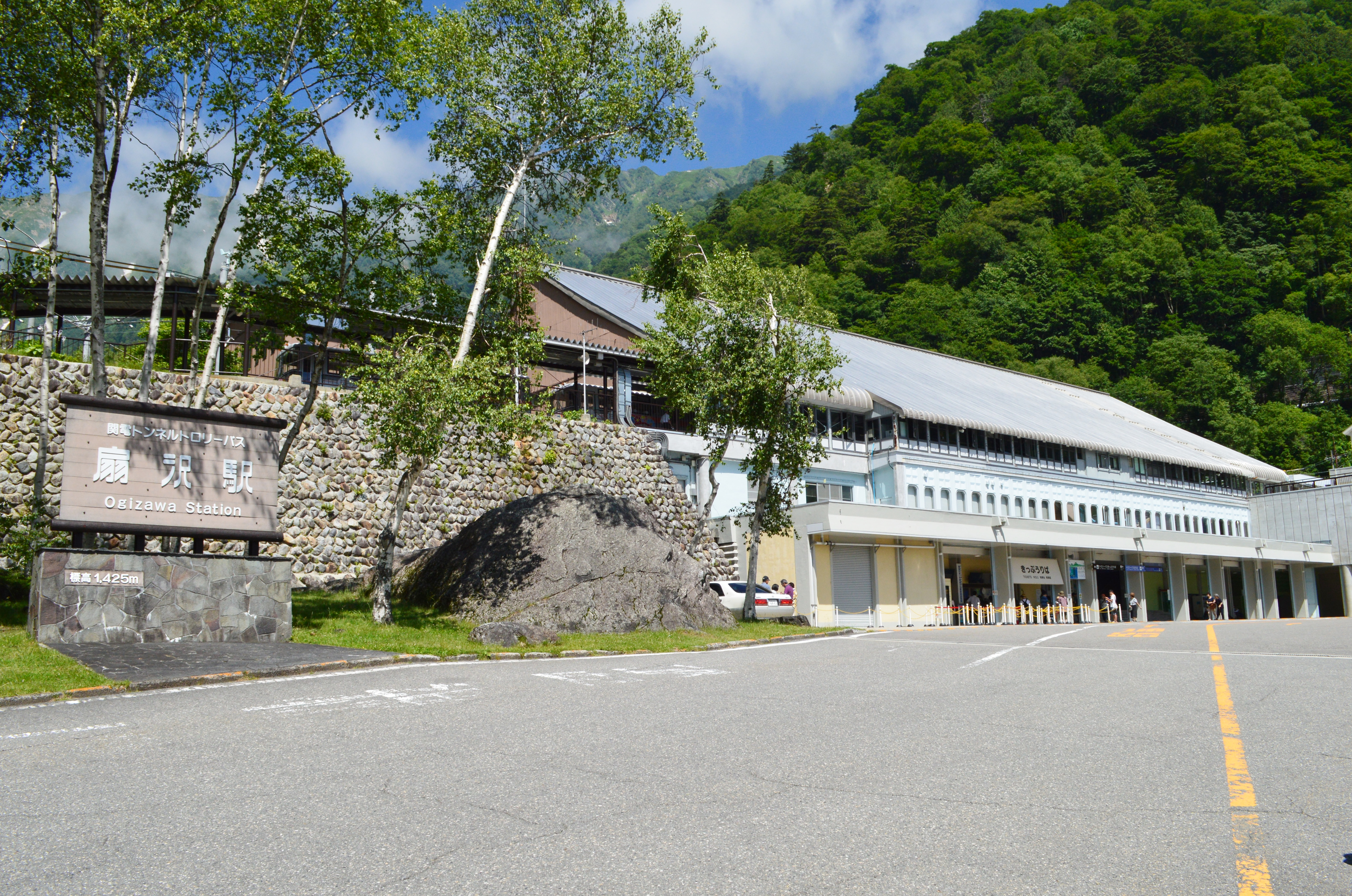 扇沢駅 駅舎